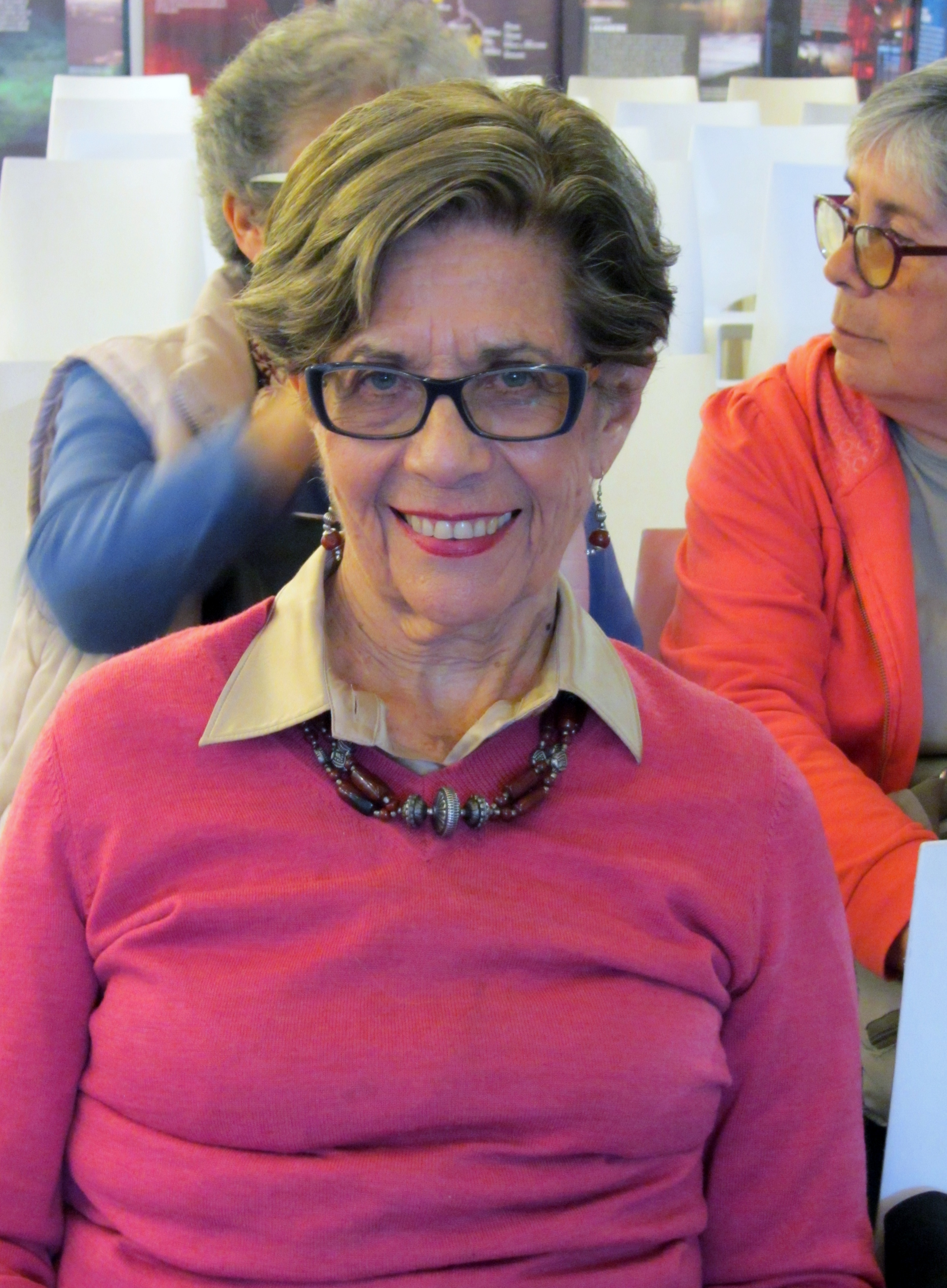 La pedagoga y profesora chilena Beatrice Ávalos en la Feria Internacional del Libro de Santiago 2015